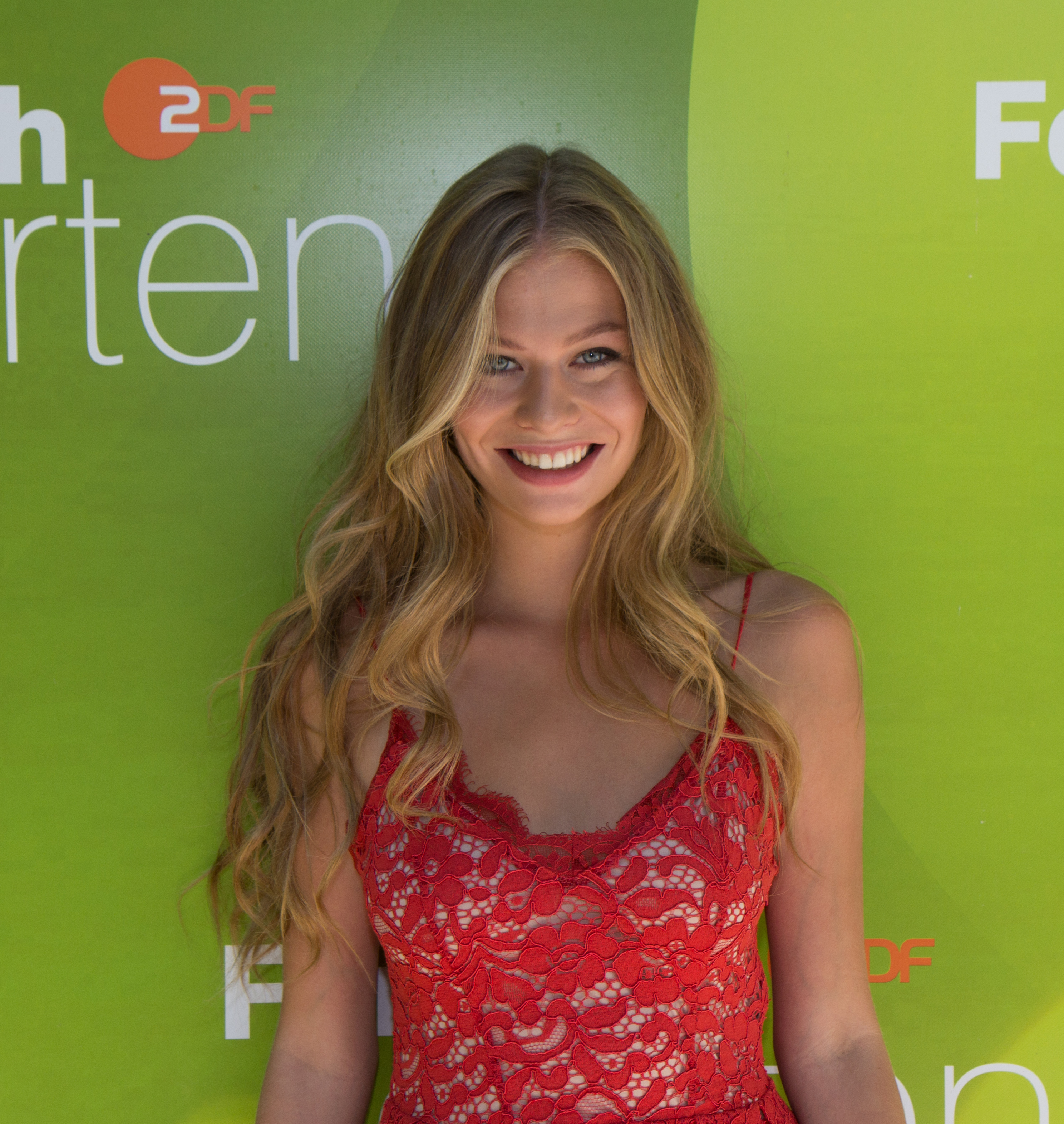 Zoë als Gast im ZDF-Fernsehgarten am 19. August 2018 in Mainz.